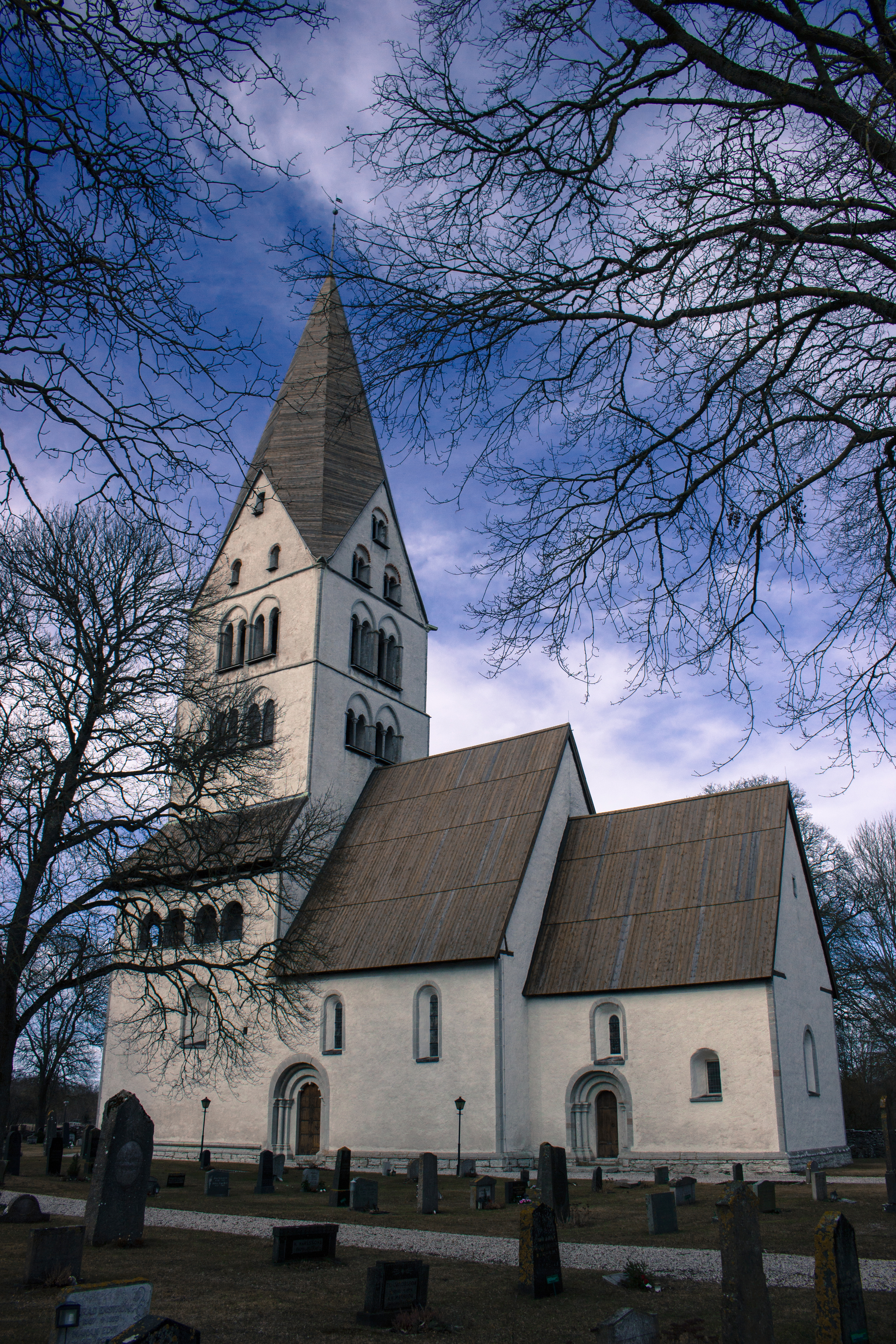 Igrexa de Stenkyrka, na illa sueca de Gotland.